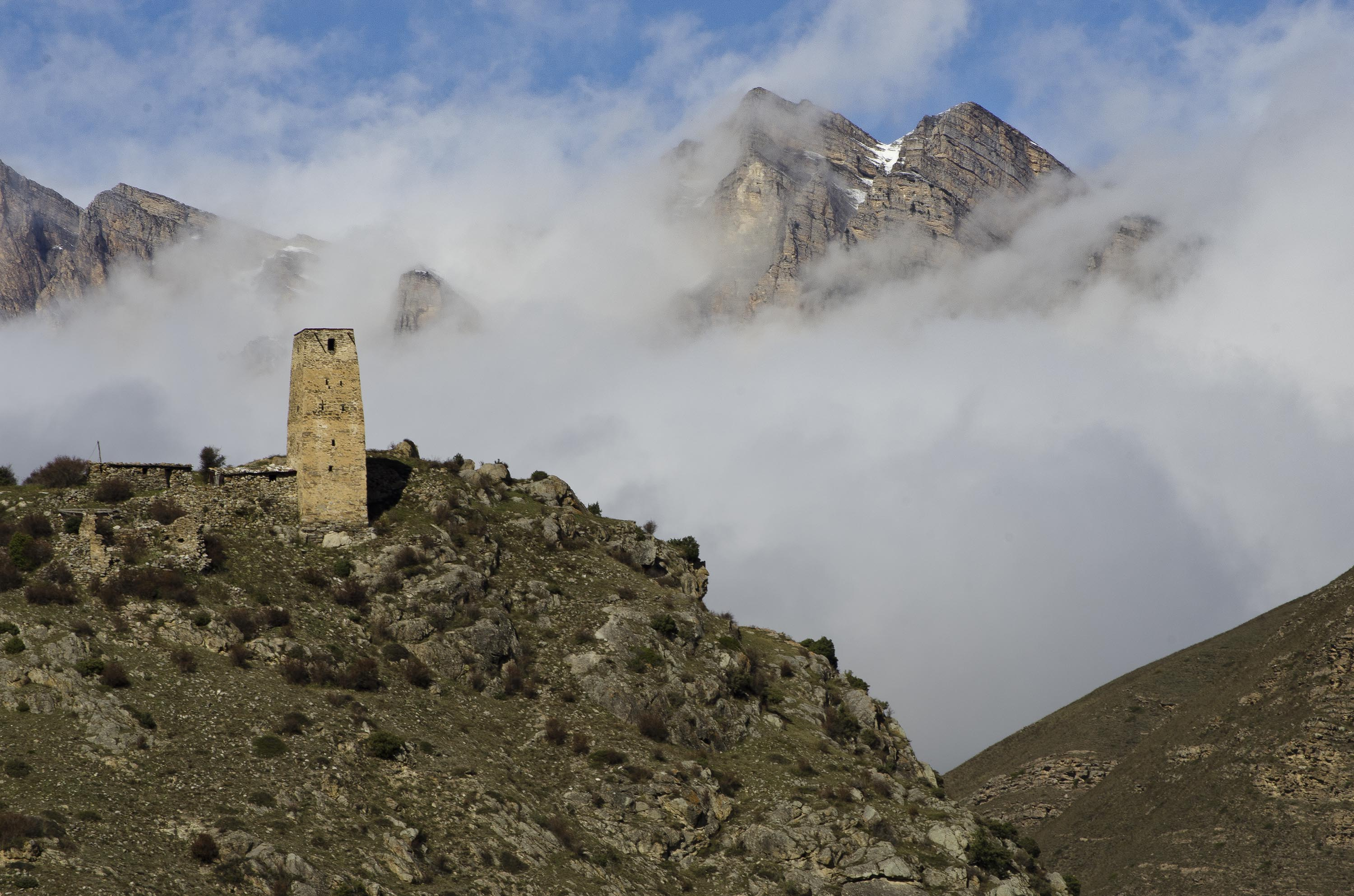 РСО-Алания ФГБУ "Национальный парк "Алания" с.Махческ